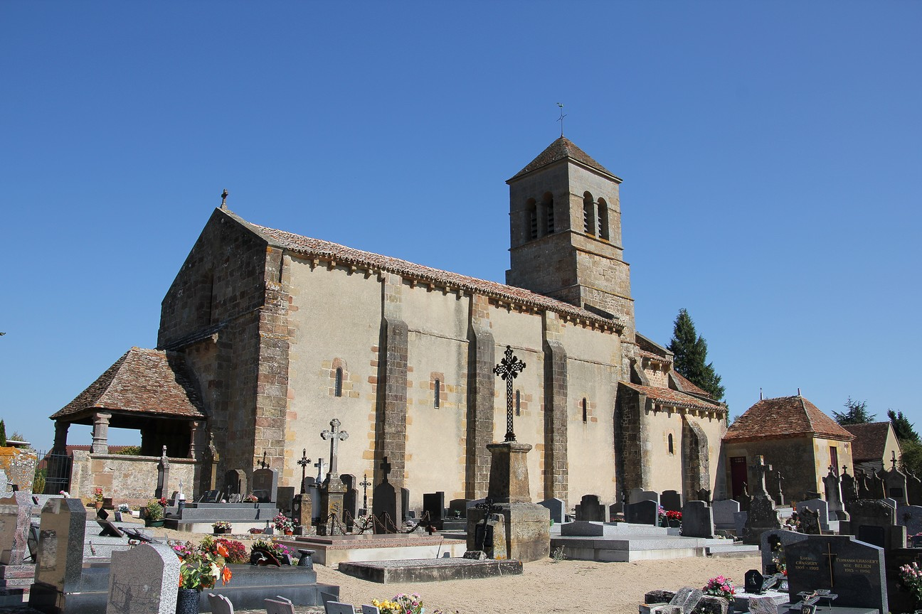 Eglise St Martin de Coulandon (03), vue du cimetière